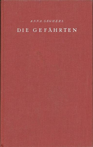 Anna Seghers, Die Gefährten, Universum-Bücherei für Alle, Berlin. 318 S. Erste Ausgabe. Zugleich mit der Ausgabe bei Kiepenheuer erschienen. (= 121. Band der Universum-Bücherei.)